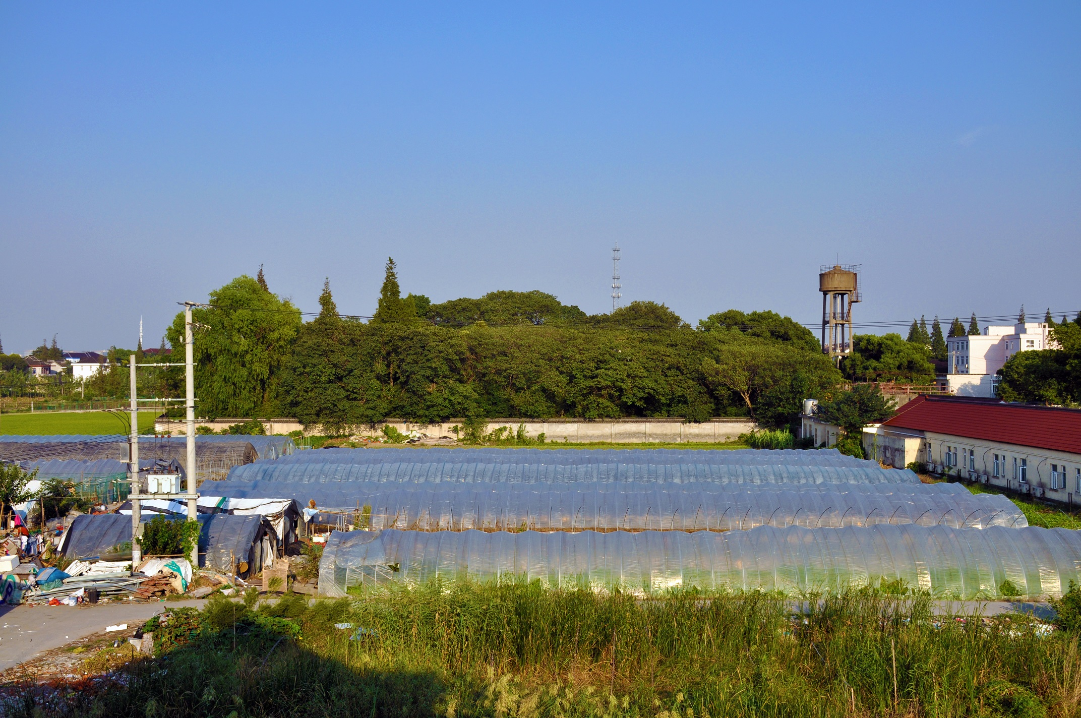 福泉山古文化遗址 重固镇福泉山周围 新石器时代、商、周时期